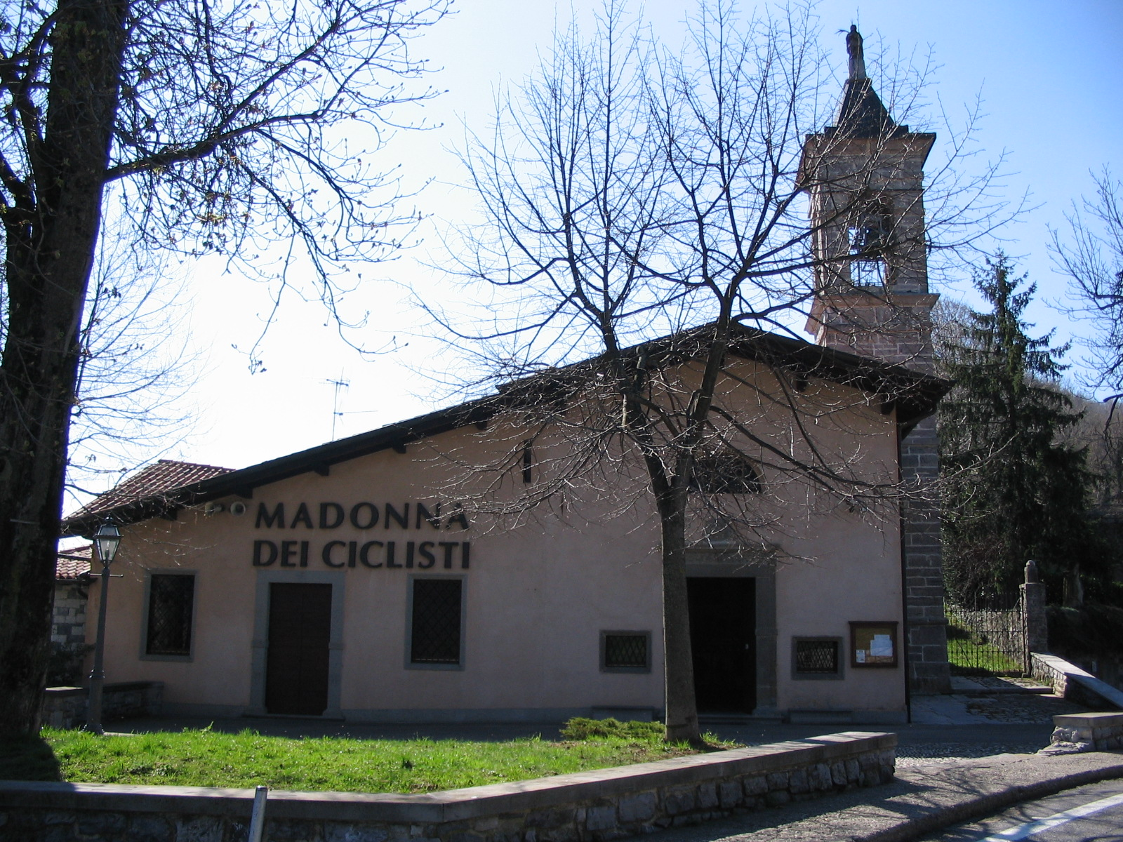 Autore Giorces. Gaverina Terme Bg, Colle del Gallo, chiesa Madonna dei ciclisti.